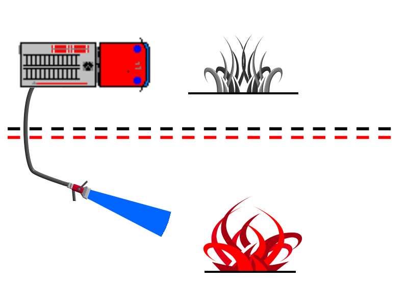 Schema des Pump&Roll